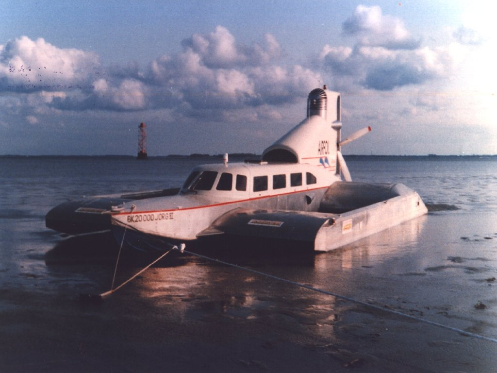 Tandem Airfoil Flairboat, Jörg III, auf Sandbank im Bodden (Ostsee)